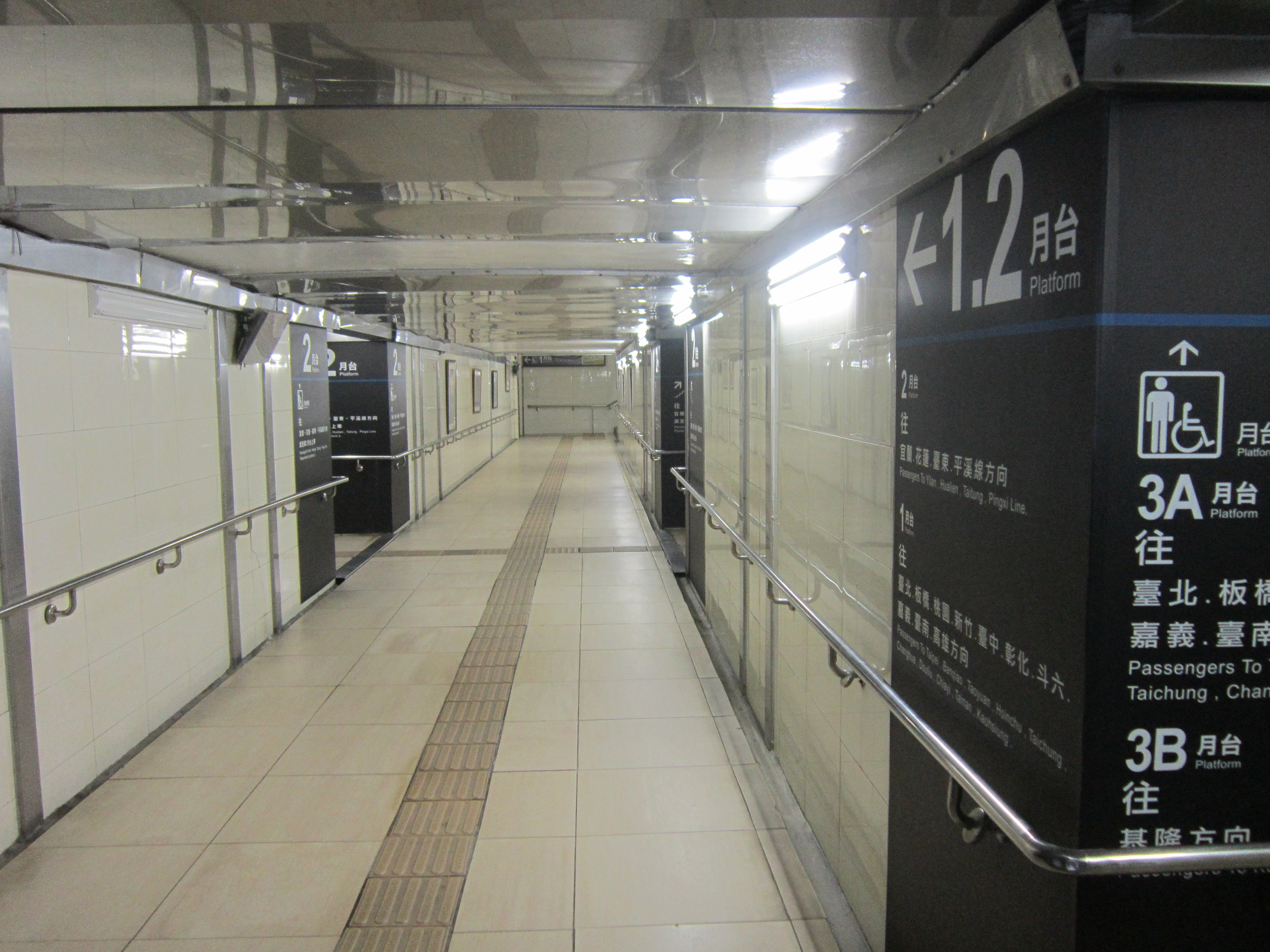 臺灣鐵路管理局八堵車站連接第一、二、三月台的人行地下道。